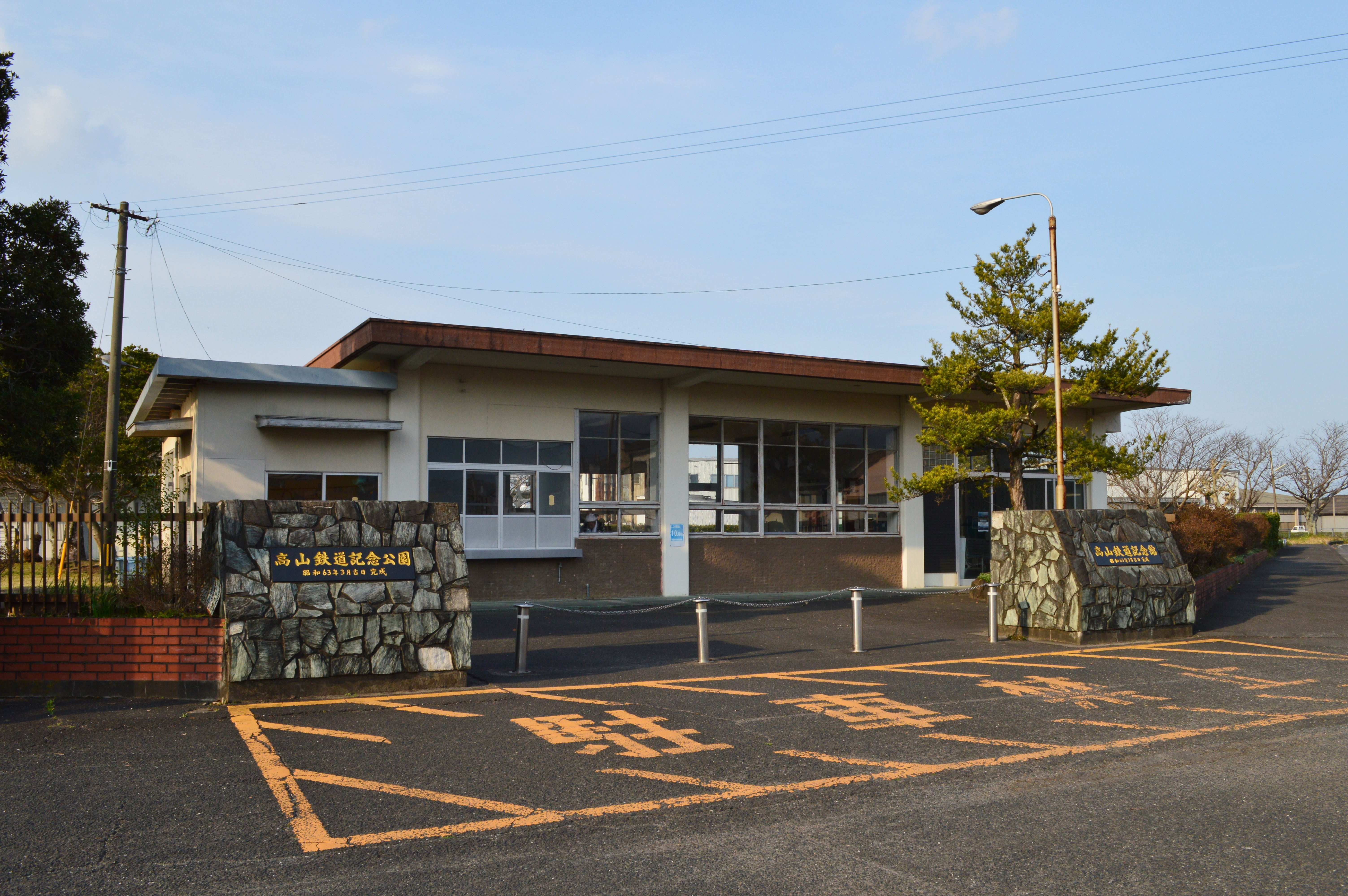 高山鉄道記念公園 大隅高山駅舎跡